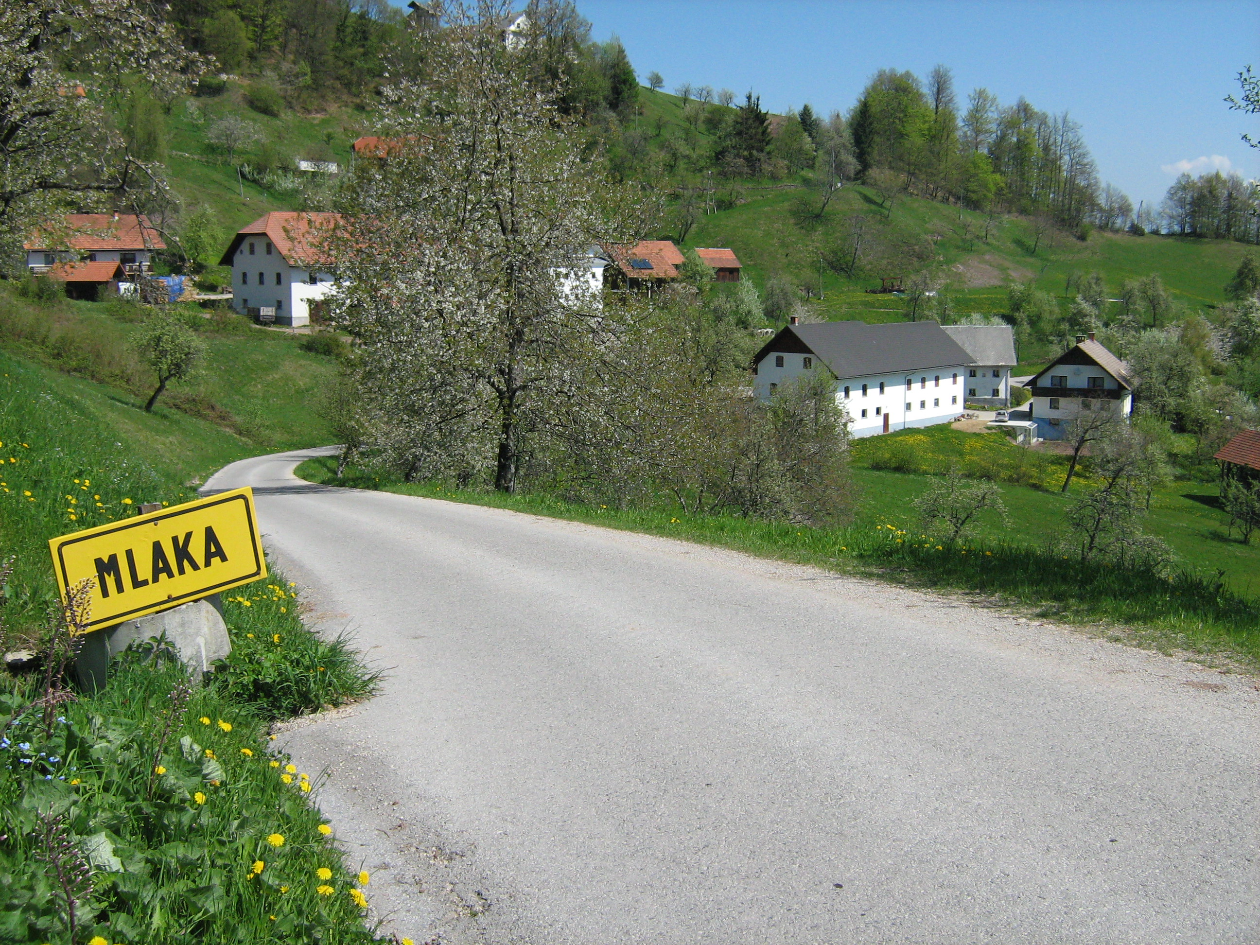 Mlaka nad Lušo s ceste Mlaka nad Lušo - Javorje